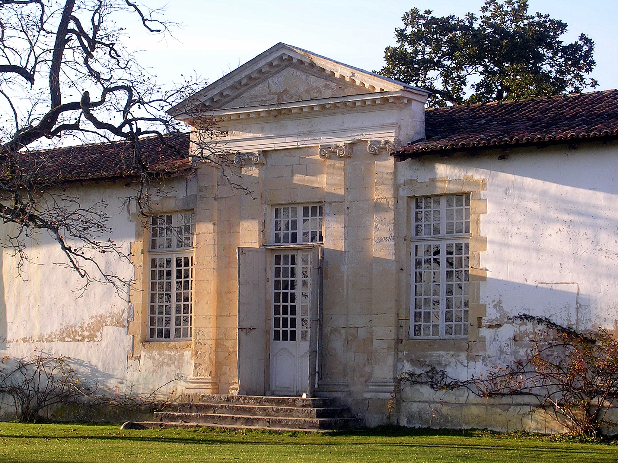 Château de Gaujacq, dans les Landes (France)